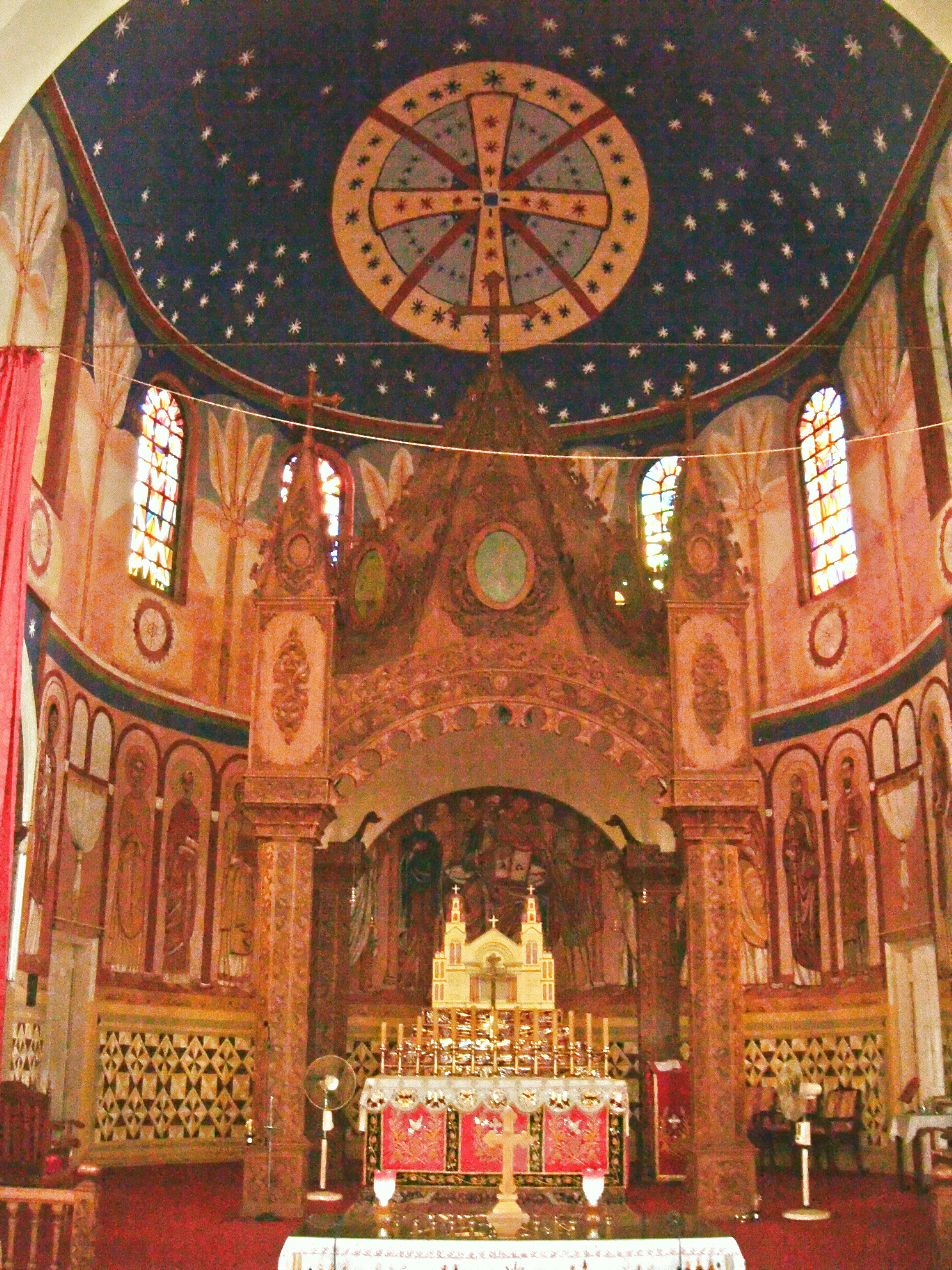 Trivandrum, Kerala, Indien, St. Mary`s Cathedral